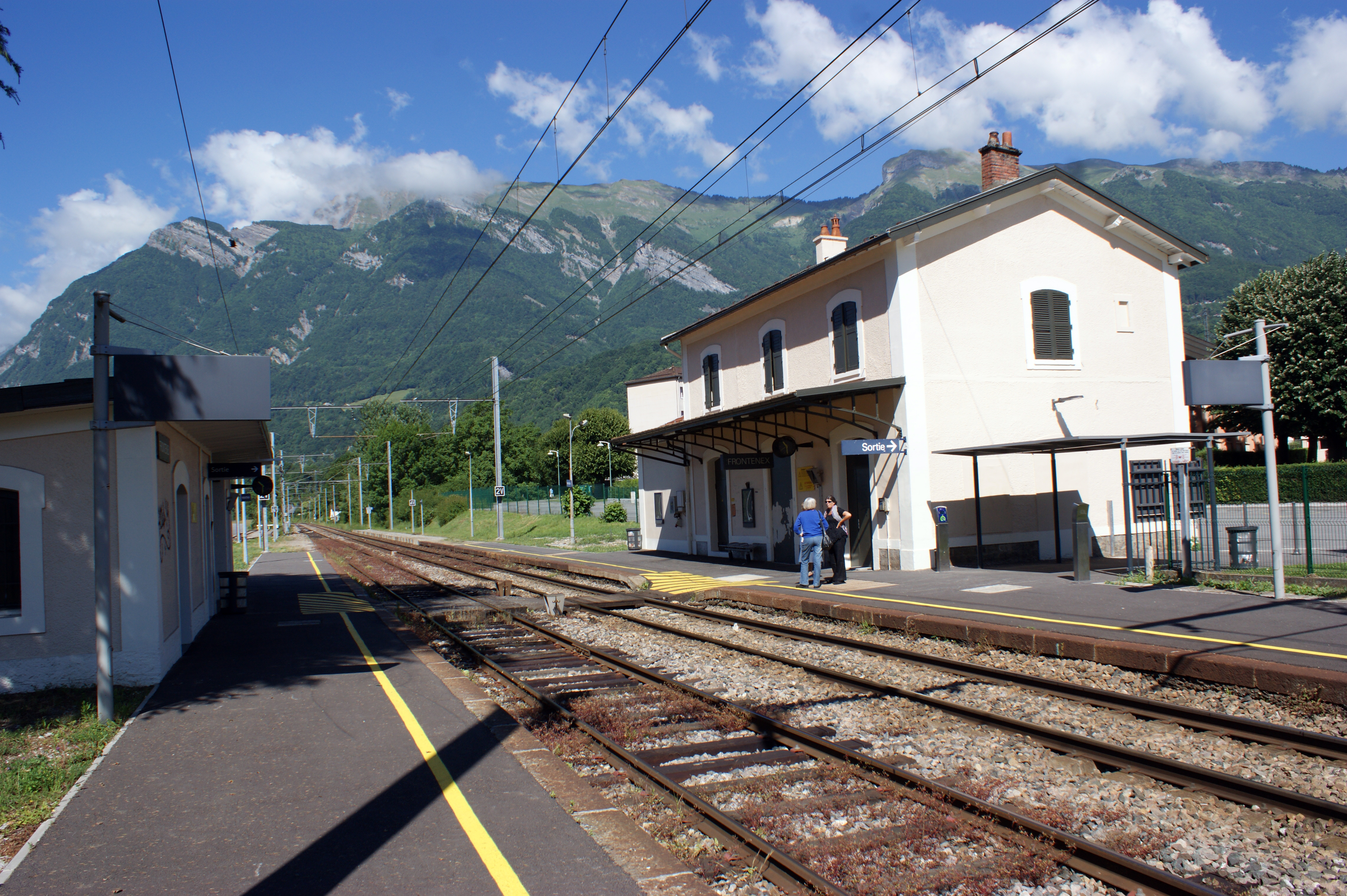 L'intérieur de la gare de Frontenex, avec les voies, les quais, l'ancien bâtiment voyageurs et l'abri de quai.